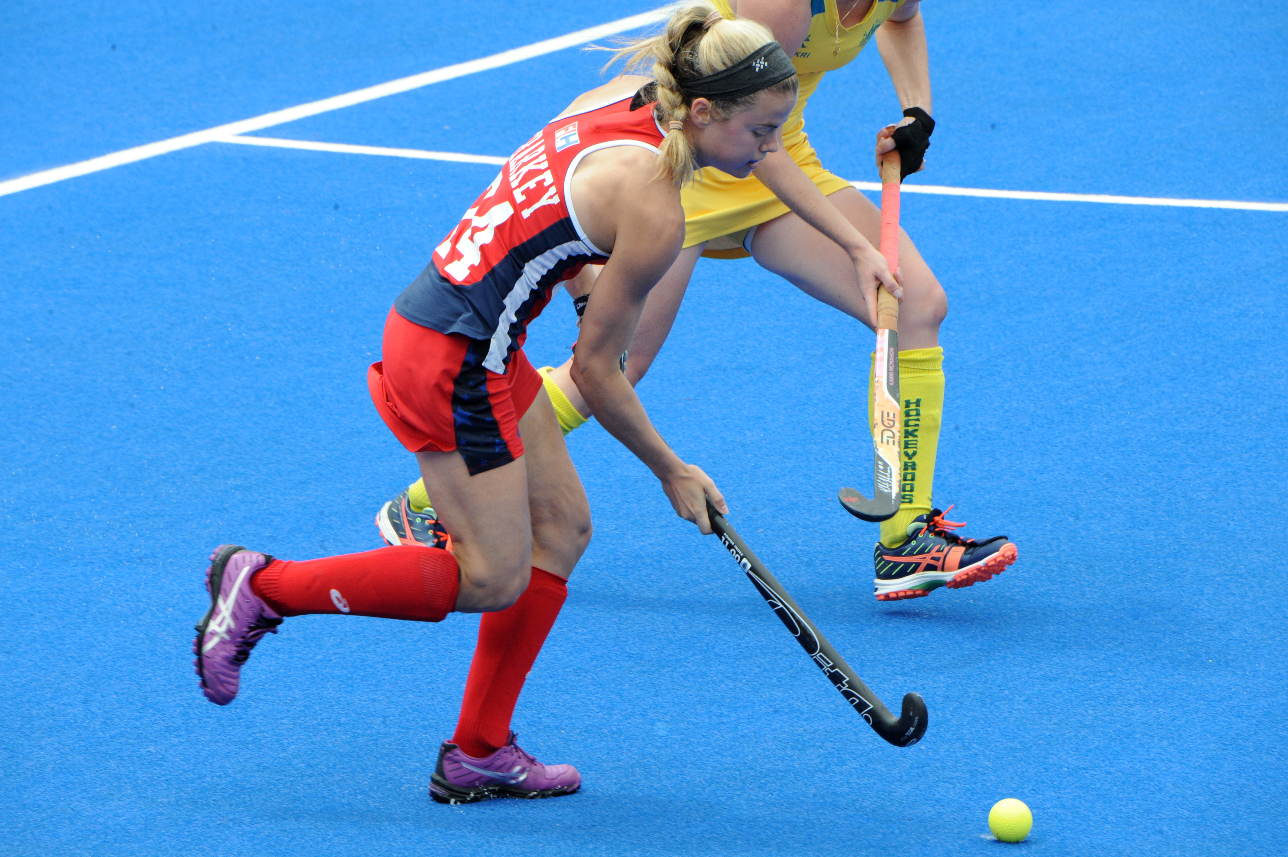 USA v Australia CT 2016